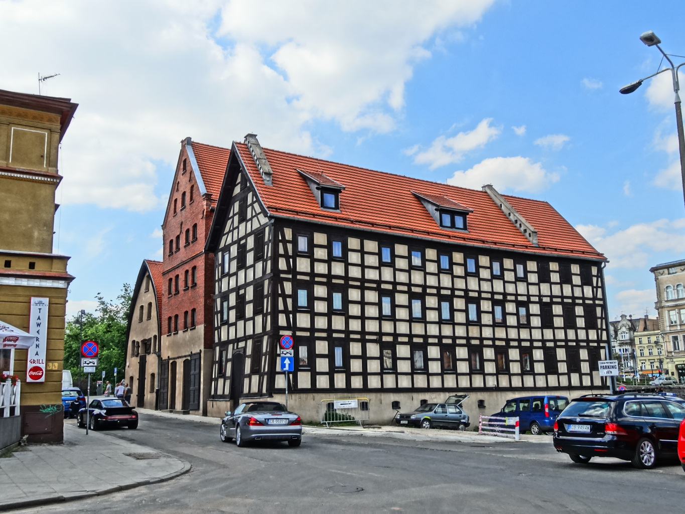 Spichrze nad Brdą w Bydgoszczy, zbud. w latach 1793-1800, od 1964 r. w gestii Muzeum Okręgowego